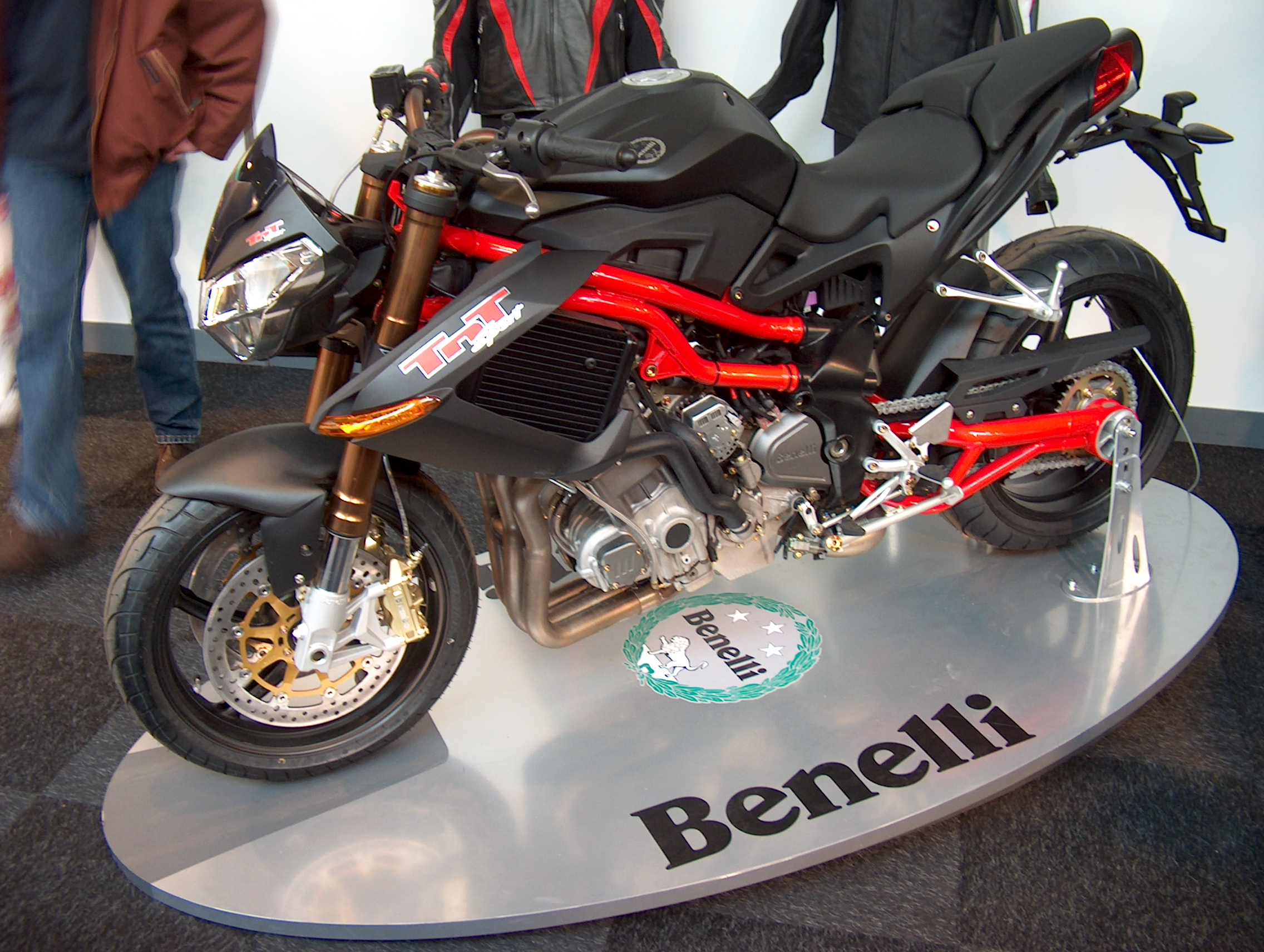 De Benelli TnT 1130 Sport is de streetfighter-versie van de Benelli Tornado 900 Tre Novecento. Toestemming van Henk Elshout